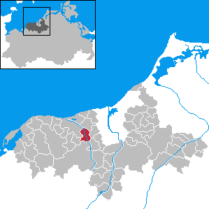 Bartenshagen-Parkentin in Mecklenburg-Western Pomerania - District Bad Doberan